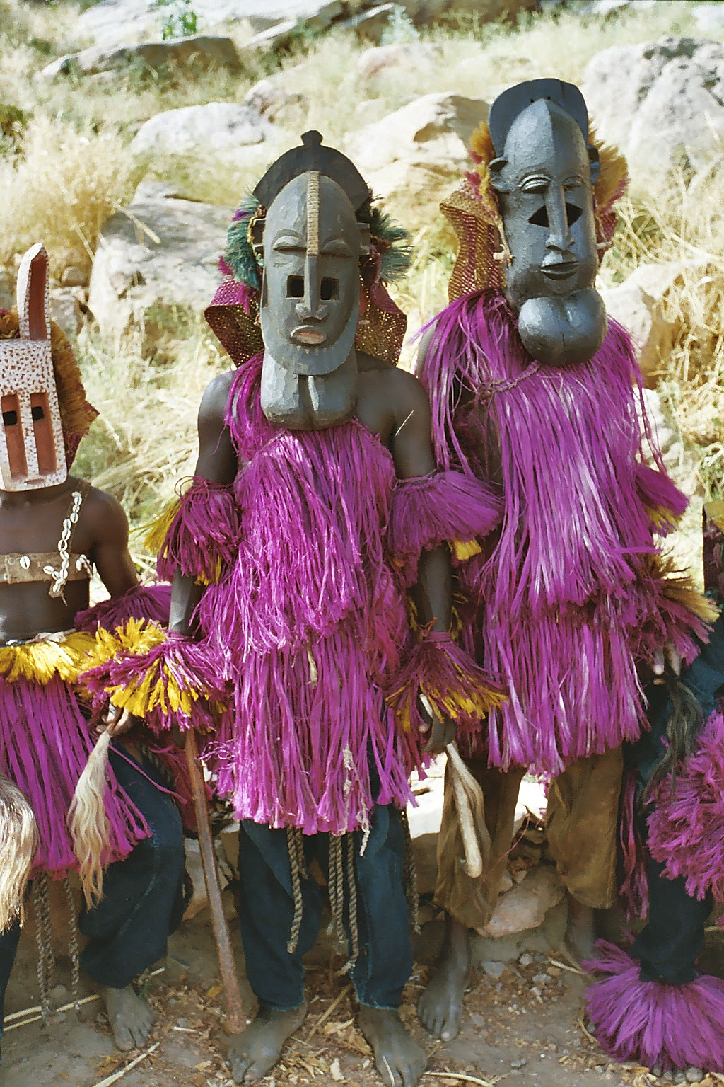 Dogon people, Mali.